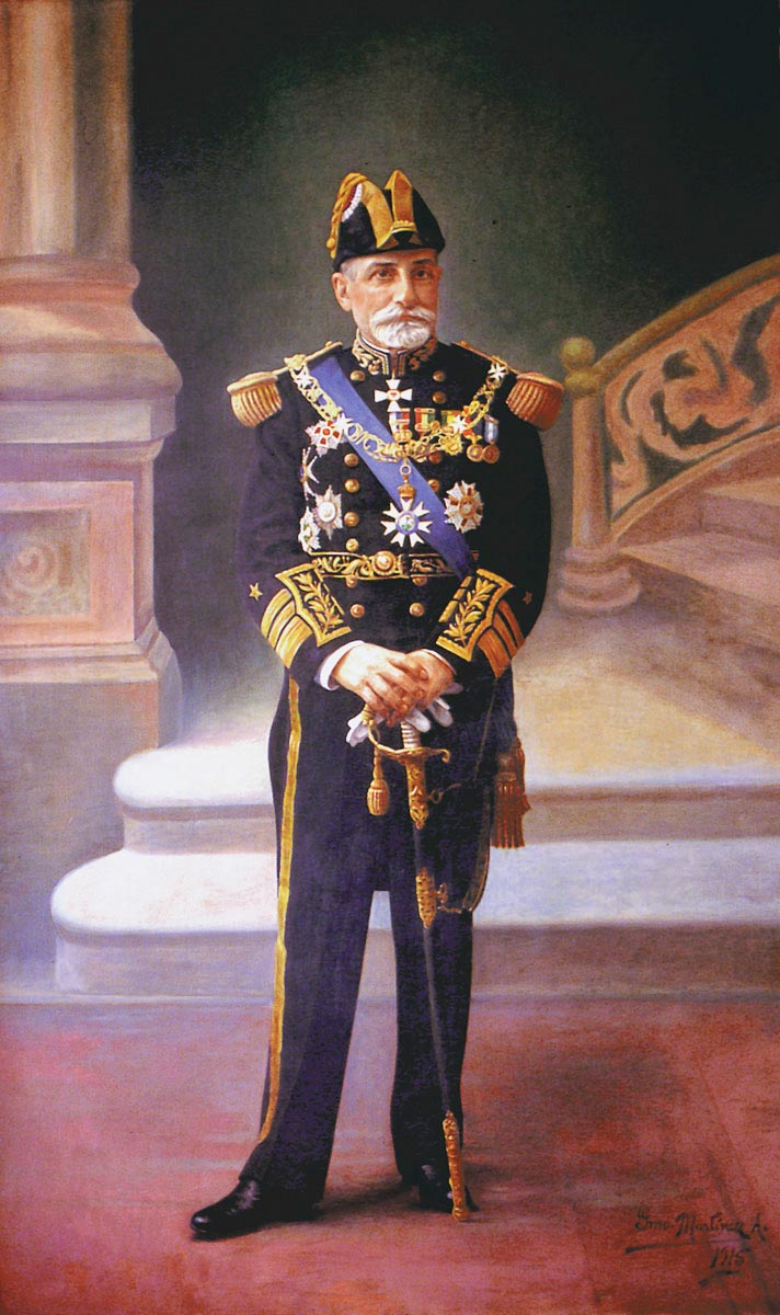 Jorge Montt Álvarez (Casablanca; 26 de abril de 1845 - † Santiago; 9 de octubre de 1922) Marino y político chileno y Presidente de Chile.